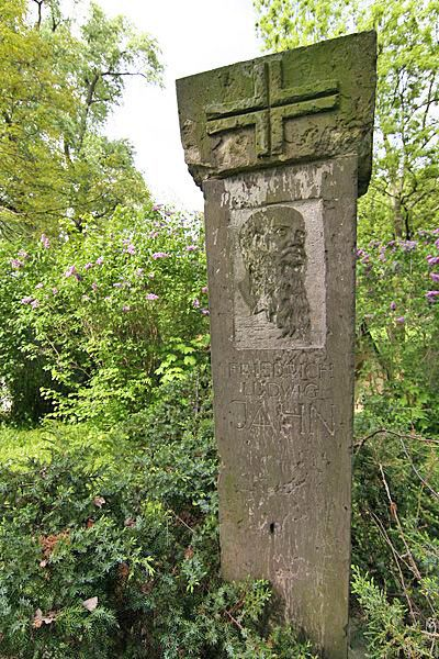 Westansicht des Denkmals. Oben ein stilisiertes Turnerkreuz, darunter das Portrait und der Name des Turnvaters Jahn. Das Denkmal steht auf dem Gelände der August-Bebel-Kampfbahn in einem eingezäunten Bereich.